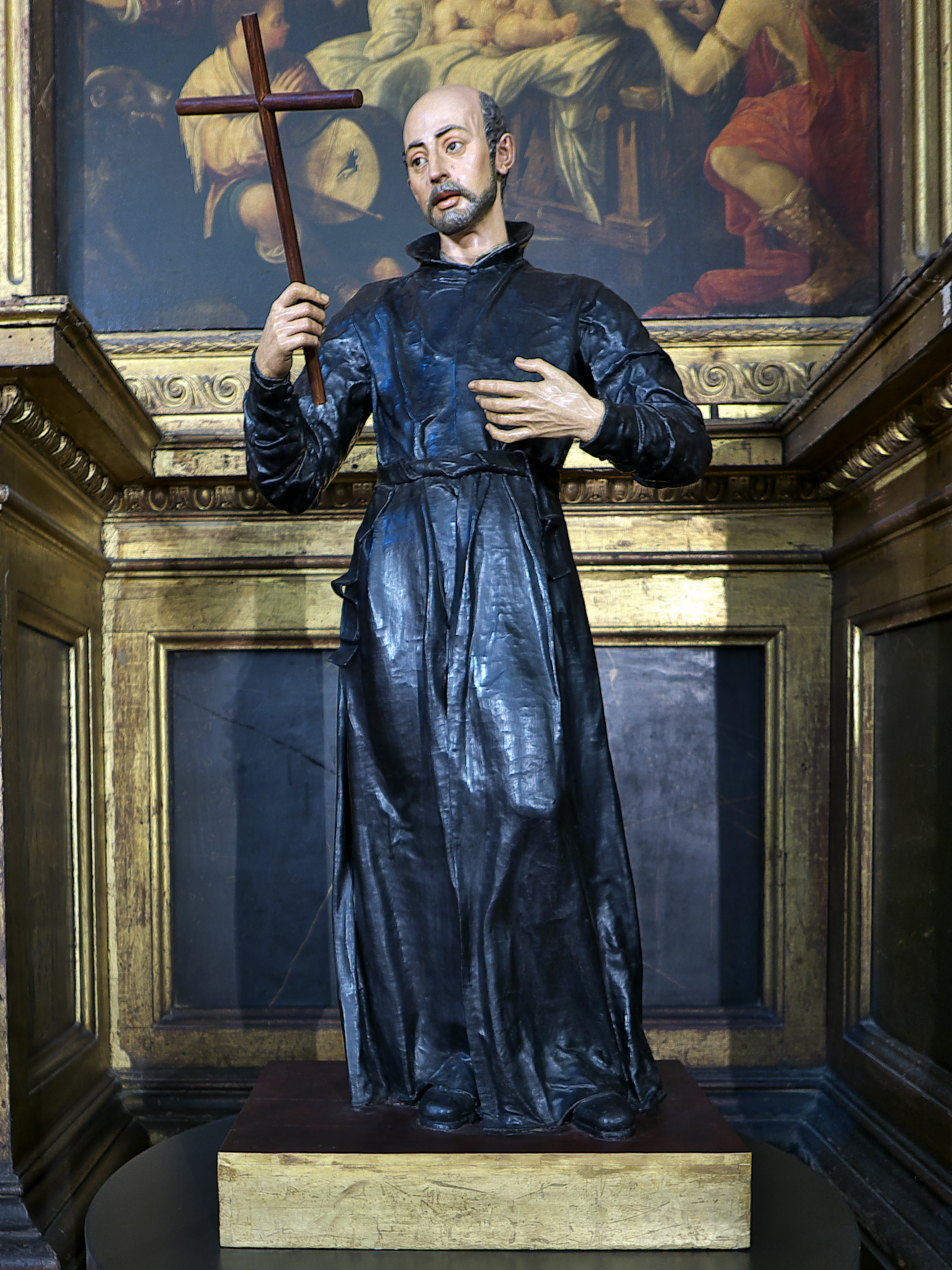 Iglesia de la Anunciación (Sevilla). Madera, tallada y policromada. La maestría de Juan Martínez Montañés y la policromía de Francisco Pacheco (1610) para la Compañía de Jesús, con motivo de la beatificación.